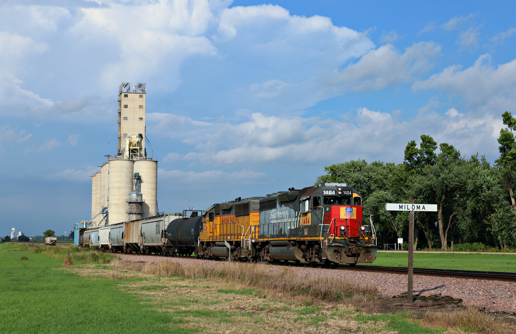 Miloma, Minnesota.